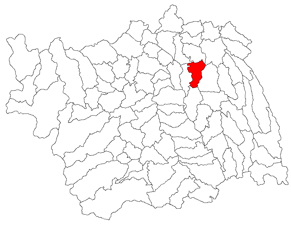 Categorie:Hărţi ale judeţului Bacău